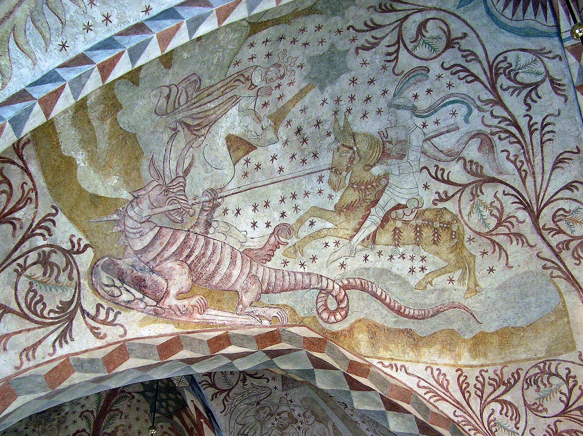 Detalje fra kalkmalerier i Højelse Kirke, Ll. Skensved. Kalkmalerierne er sandsynlig vis udført omkring år 1450